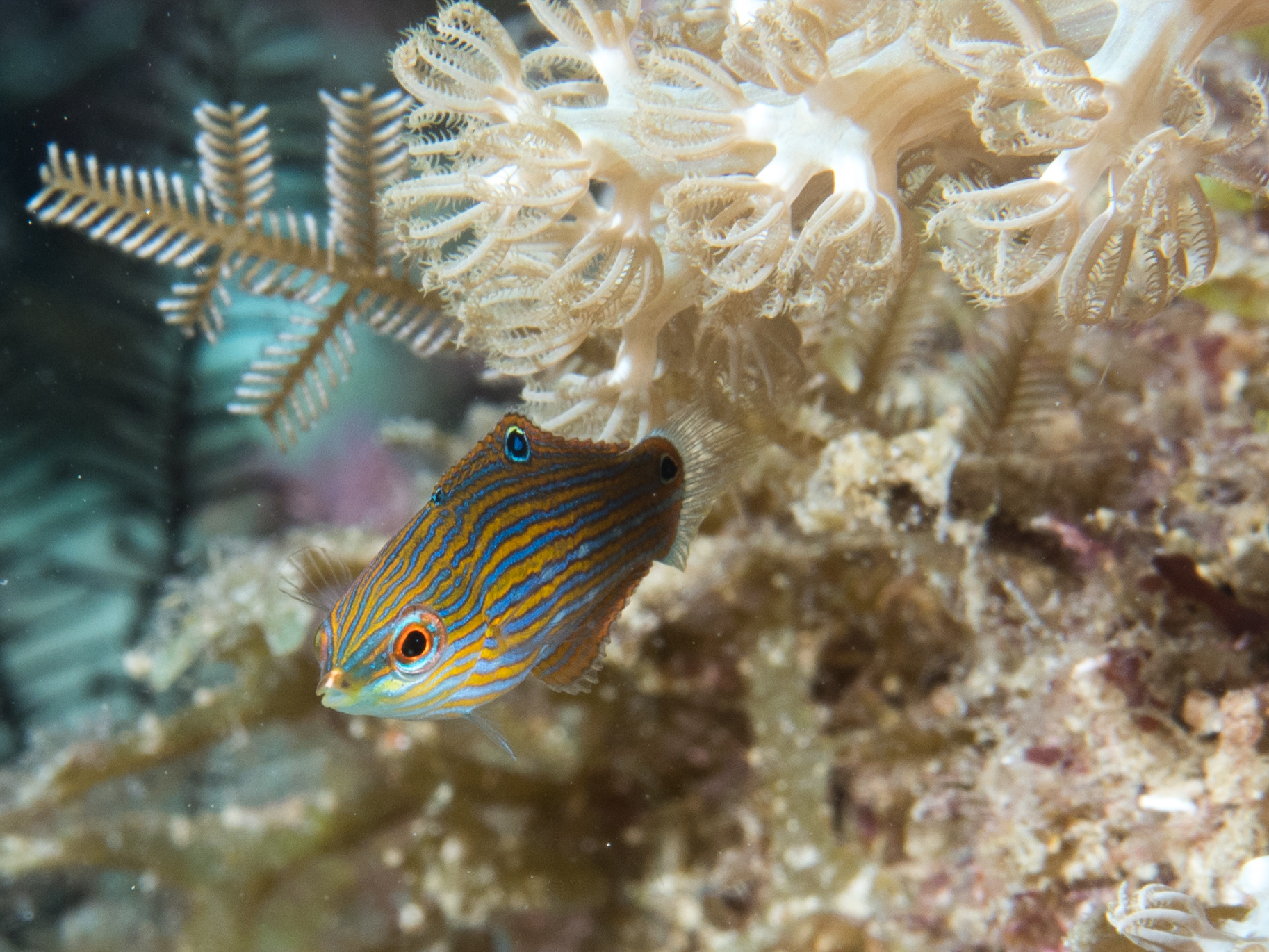 Romblon, Philippines - Tailspot wrasse juvenile (Halichoeres melanurus)